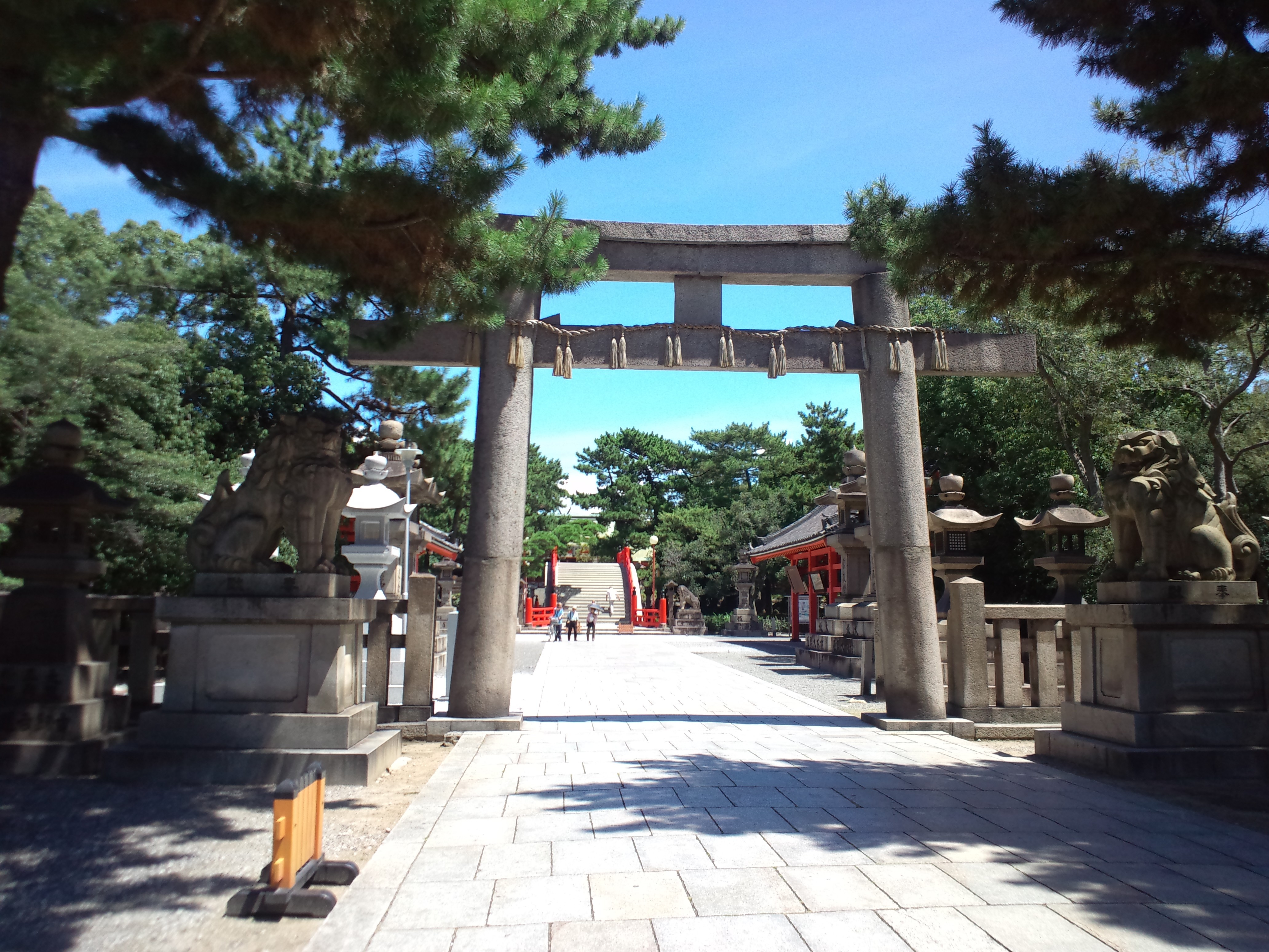 住吉大社 石鳥居